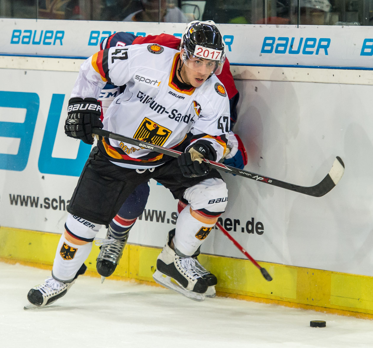 Yasin Ehliz im WM-Vorbereitungsspiel gegen die USA in Nürnberg